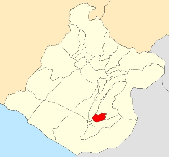 Mapa distrito Calana,Tacna - Perú